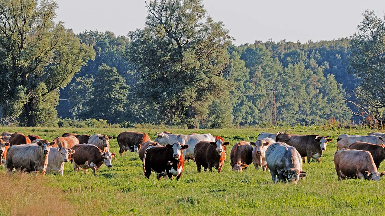 Herde von Mutterkühen in Kieve, Mecklenburg